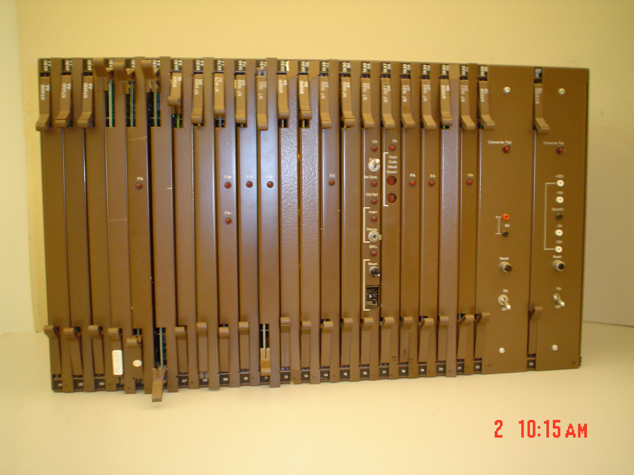 Konsistaĵo_de_diĝita_centralo.